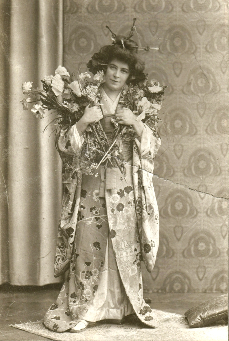 Benkő Etelka magyar opera-énekesnő (szoprán). Gödöllői Ambrus Emlékház fotógyűjteménye